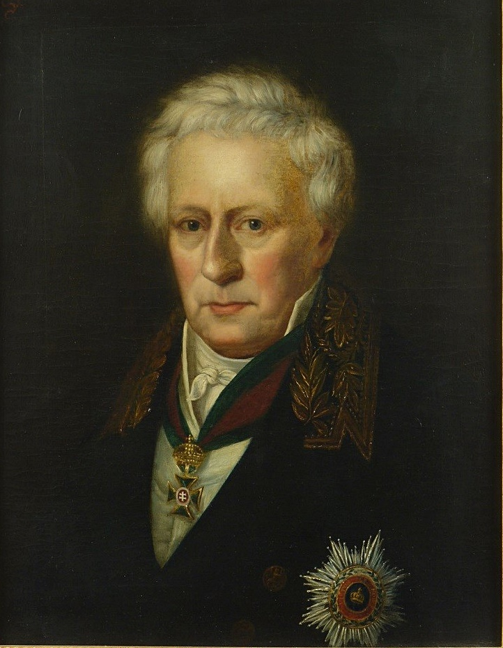 Franz Xaver von Zwackh auf Holzhausen (1756-1843), Regierungspräsident Rheinpfalz